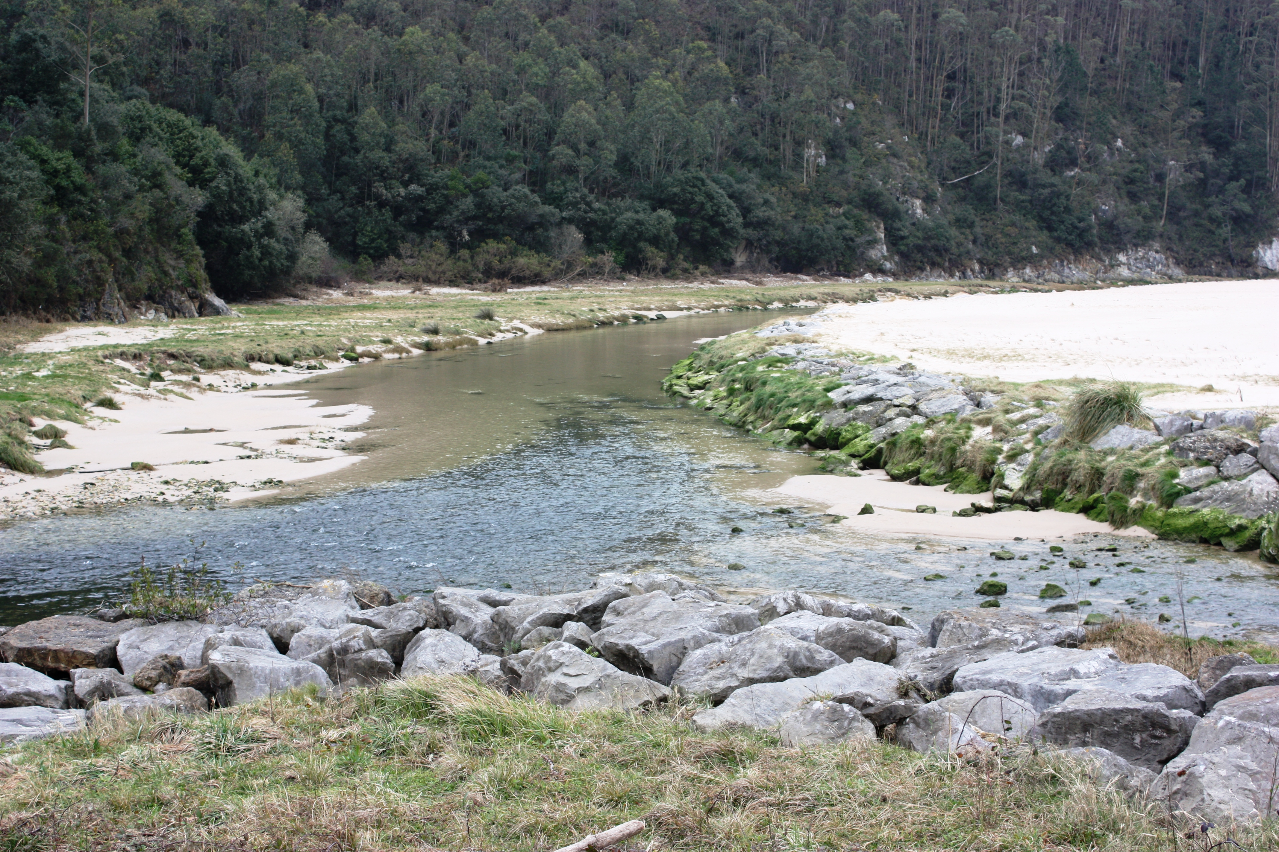 Desembocadura al Cantábrico en la ensenada del mismo nombre.-1